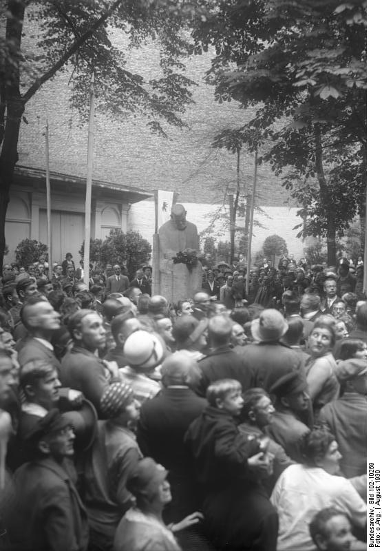 Feierliche Enthüllung des Zille-Denkmals im Garten des Theaters der Elite-Sänger in Berlin! Das erste Zille-Denkmal nach der Enthüllung.